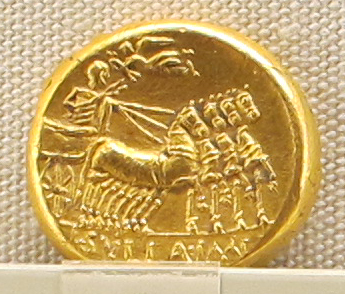 Ancient Roman coins in the Palazzo Massimo alle Terme